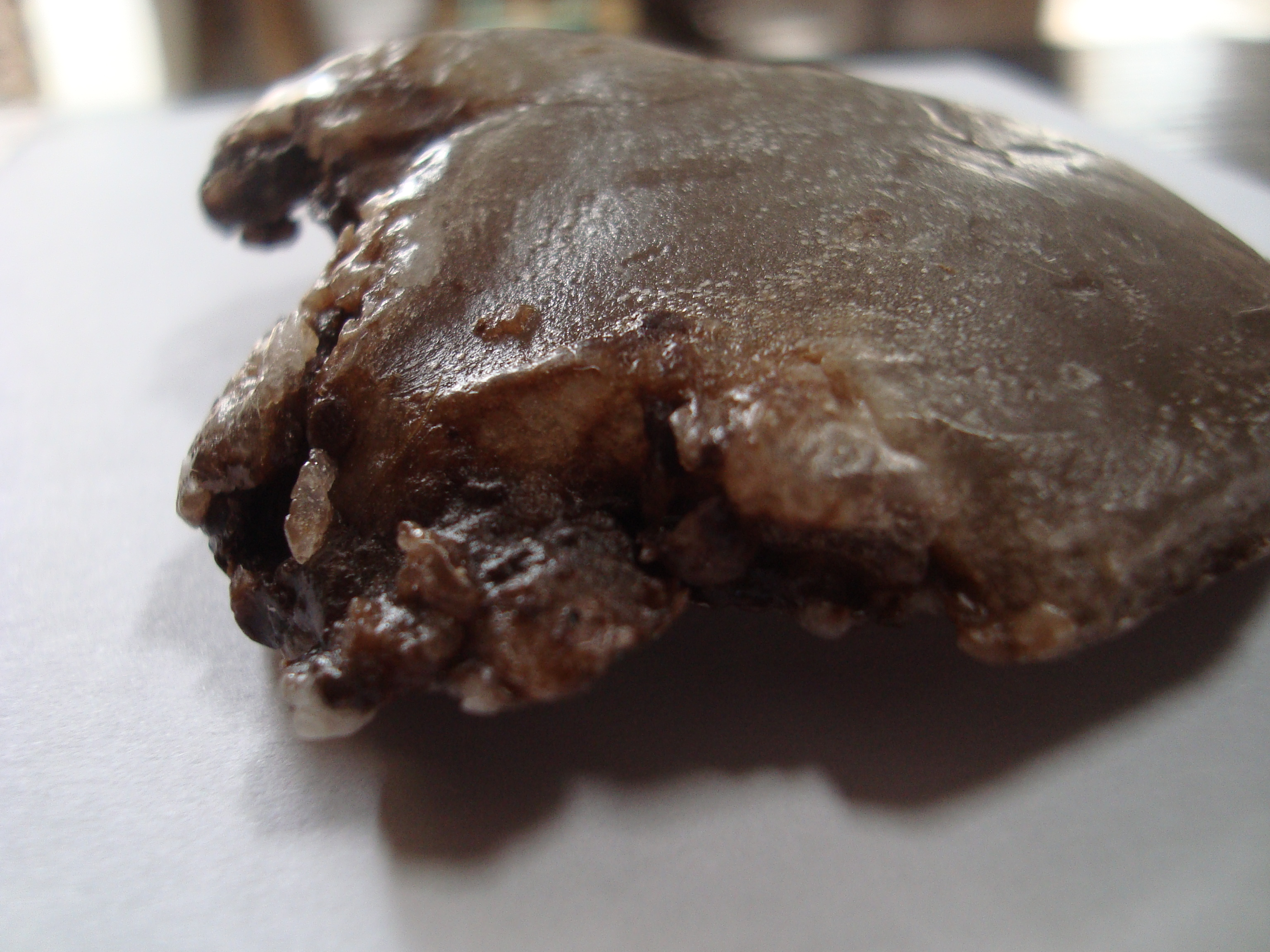 Parafín nečištěný (pevné příměsi)